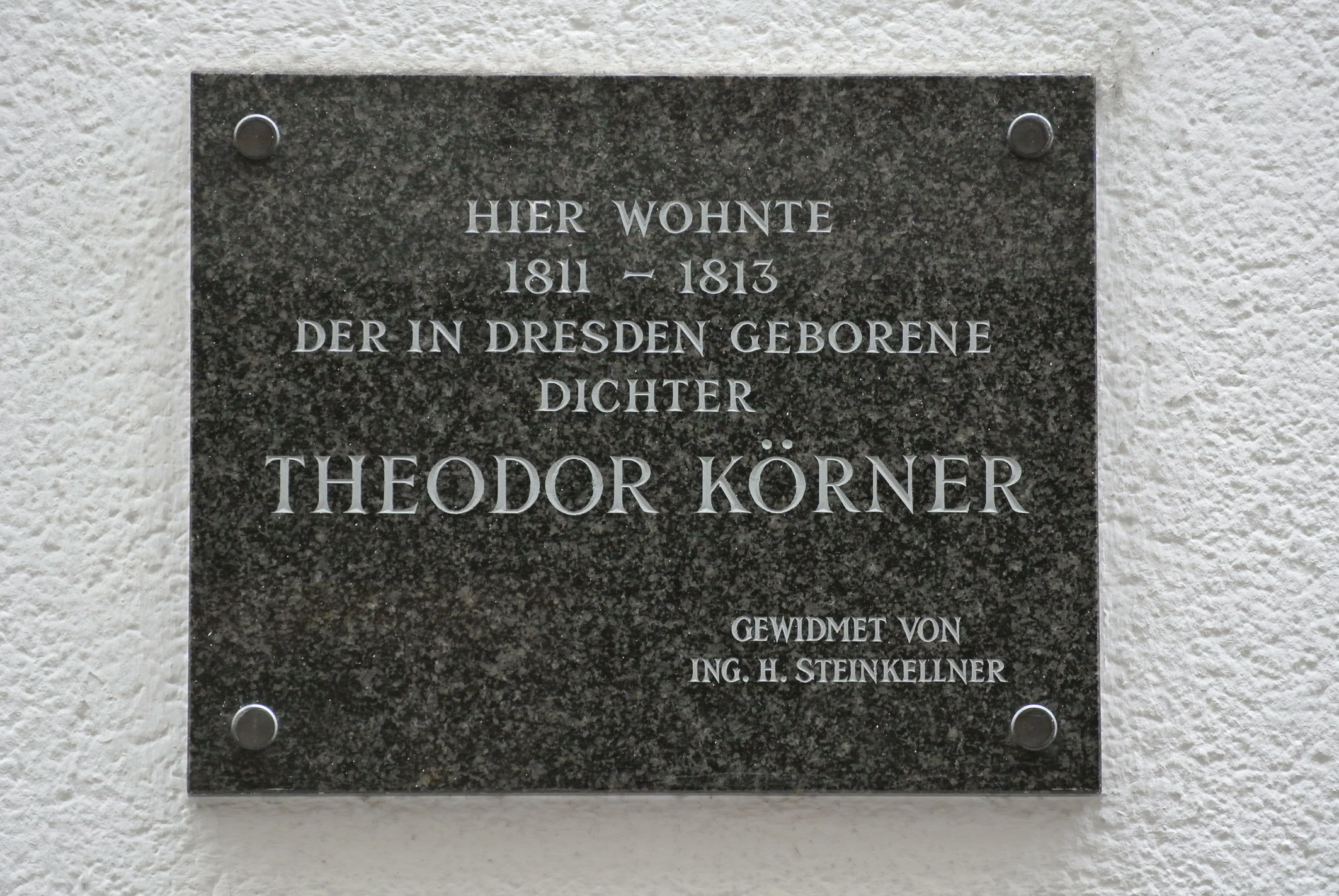 Theodor Körner (*23.9.1791 Dresden,+26.8.1813 gefallen im Forst Rosenow) - Freiheitsdichter. Wohnte von 1811-1813 in der Köllnerhofgasse, Wien-Innere Stadt.